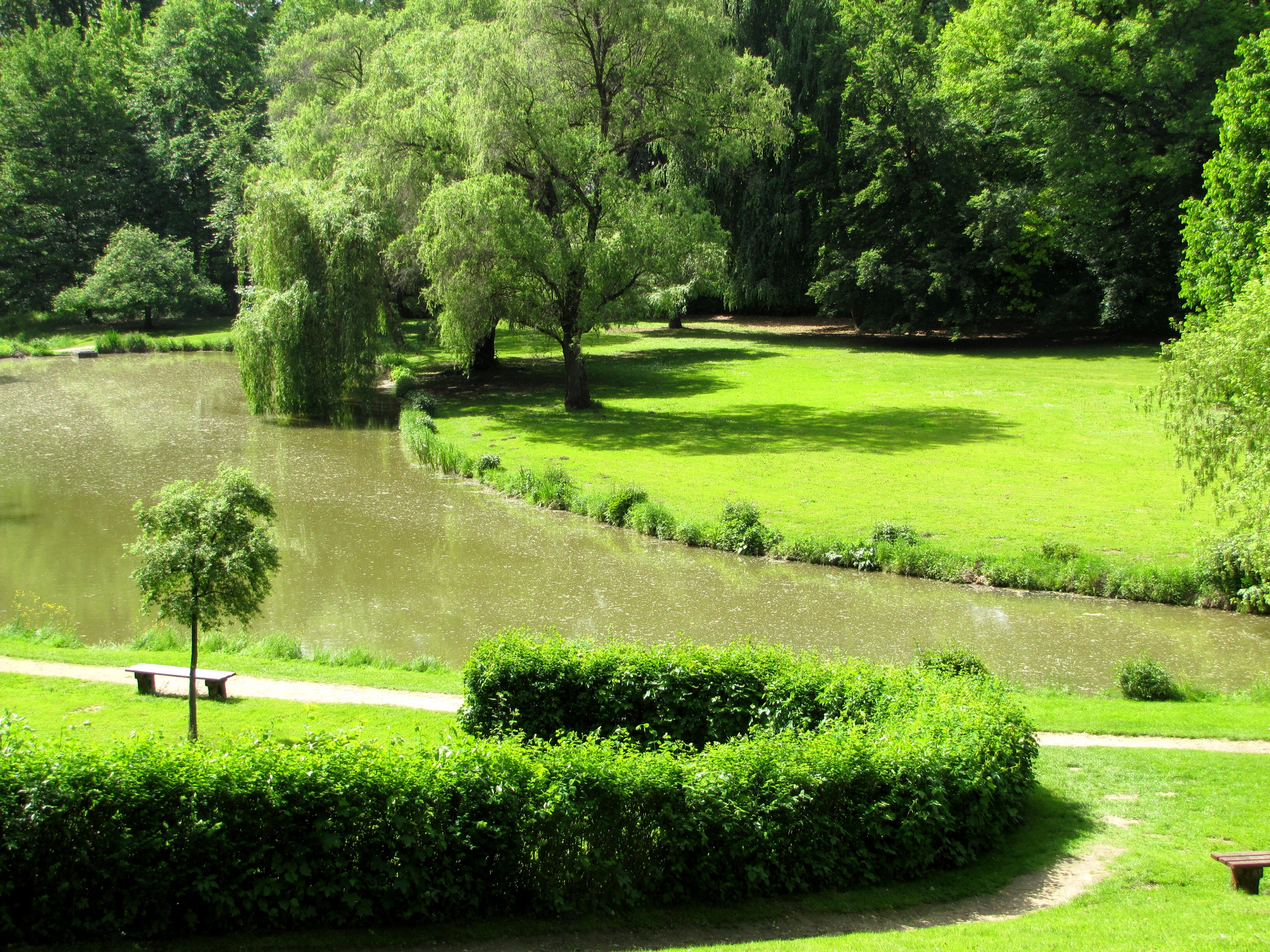 Zámecký park ve Vizovicích